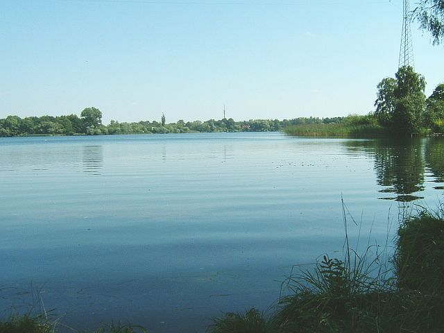 Tiefwarensee bei Waren / Müritz